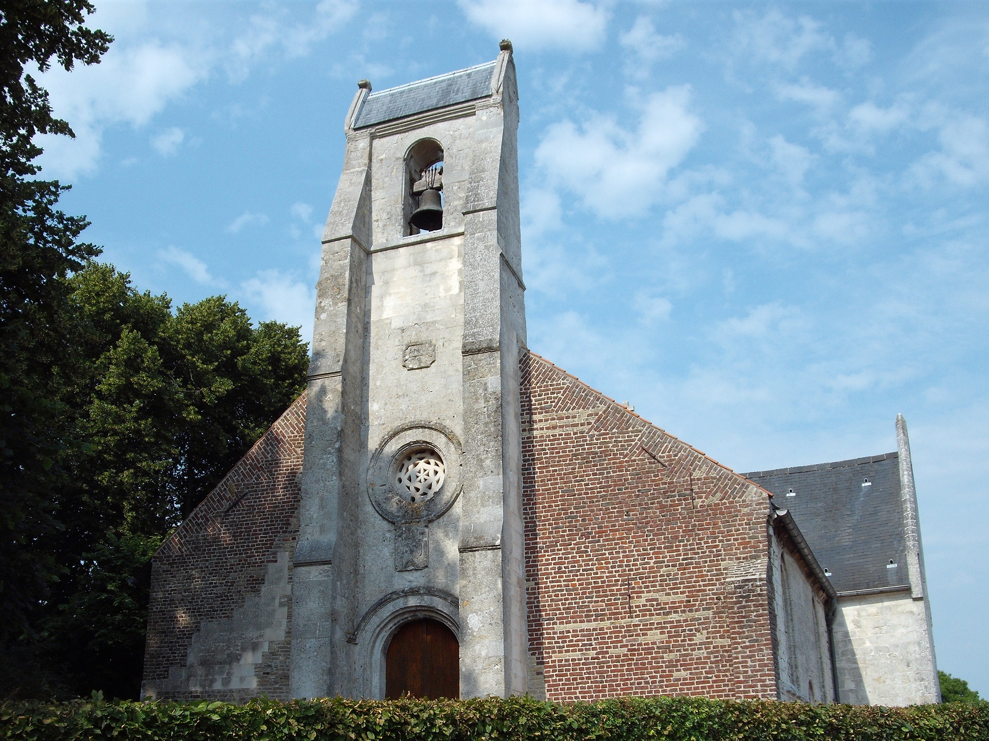 Eglise de Cormette